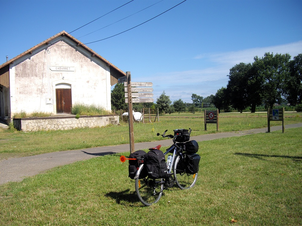 Début de la voie verte du Marsan et de l'Armagnac à l'ancienne gare de Gabarret (Landes, France).